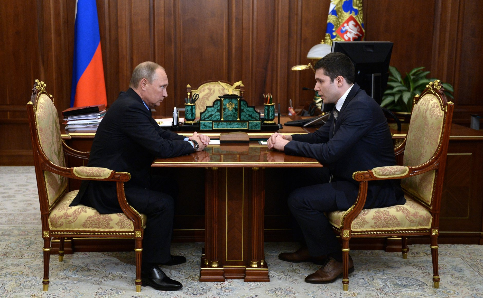 Встреча Президента России Владимира Путина с временно исполняющим обязанности губернатора Калининградской области Антоном Алихановым